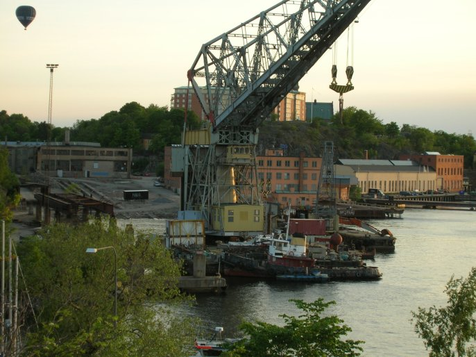 Finnboda varv seen from Kvarnholmen, Nacka, Sweden